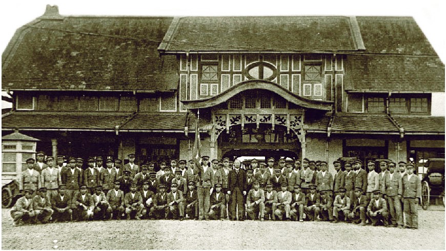 中文（台灣）: 和洋混合風格的「宜蘭驛」，為半木式構造，主入口有唐破風之捲棚頂，為宜蘭線鐵路通車而設，因人潮匯流，商家雲集，改變了宜蘭舊城市街的發展。是宜蘭人鄉愁的起點，漂泊的終點。